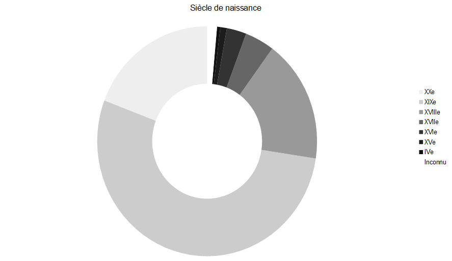 Diagramme circulaire représentant le siècle de naissance des personnalités qui ont donné leur nom à une ou plusieurs voies de Saint-Priest